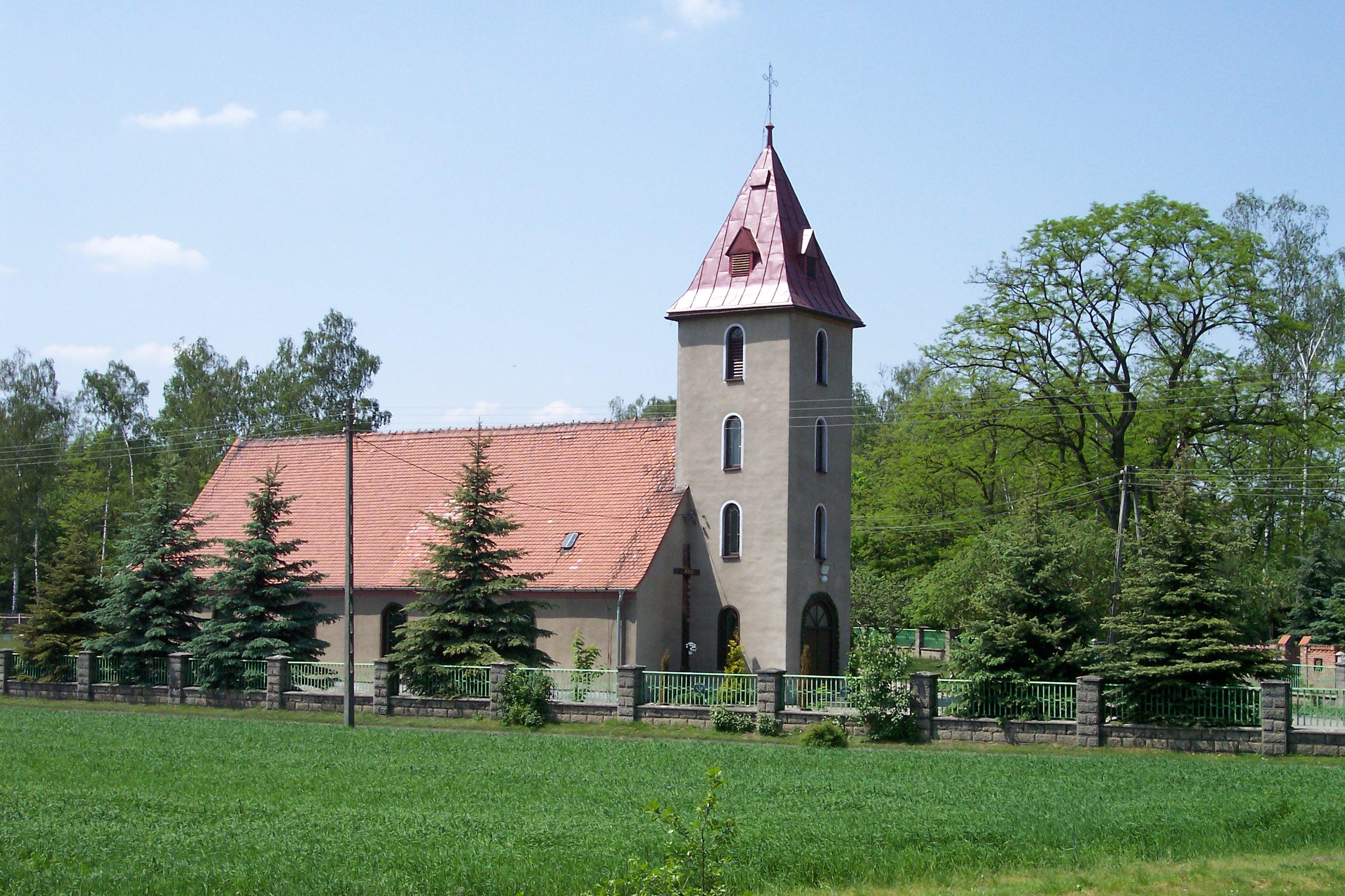 Myślina - kościół parafialny pw. św. Józefa Robotnika